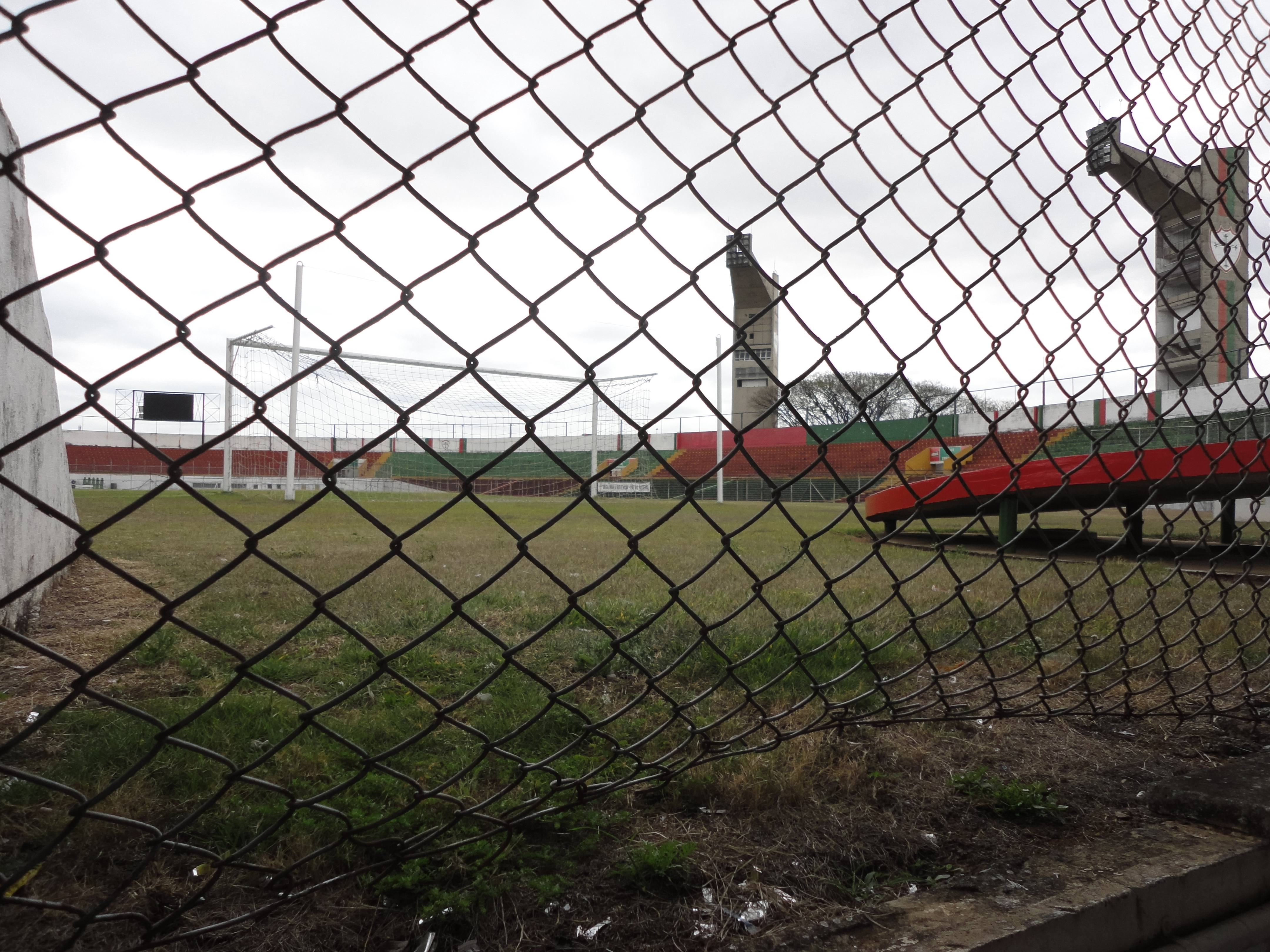 Vista do gramado pelo fosso da arquibancada do Canindé, São Paulo, Brasil